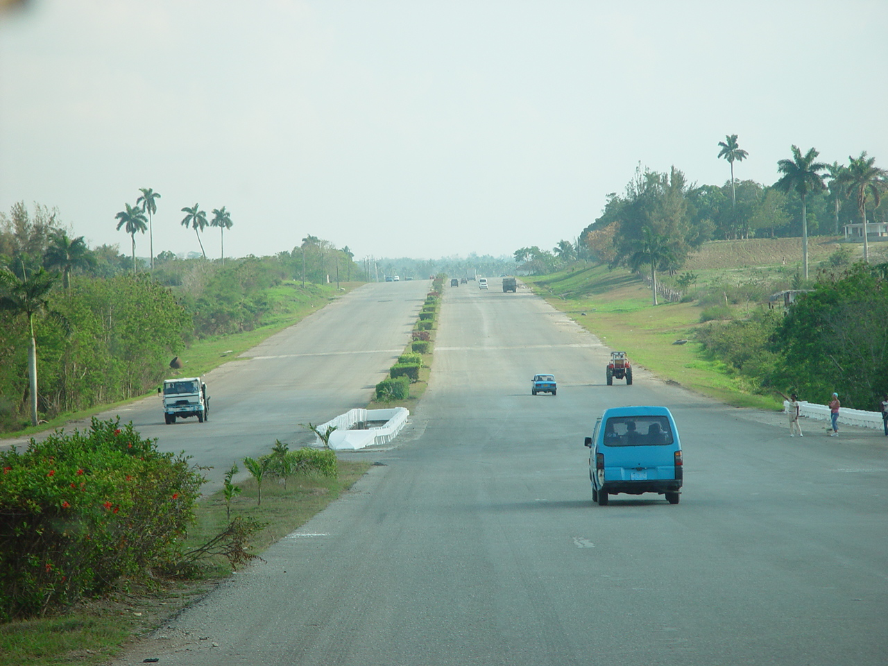 Hovedvei i Matanzas, Cuba